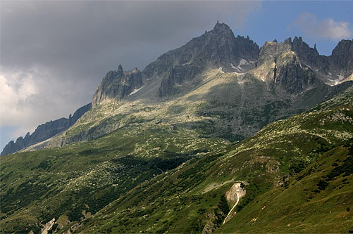 Mittagstock bei Hospental